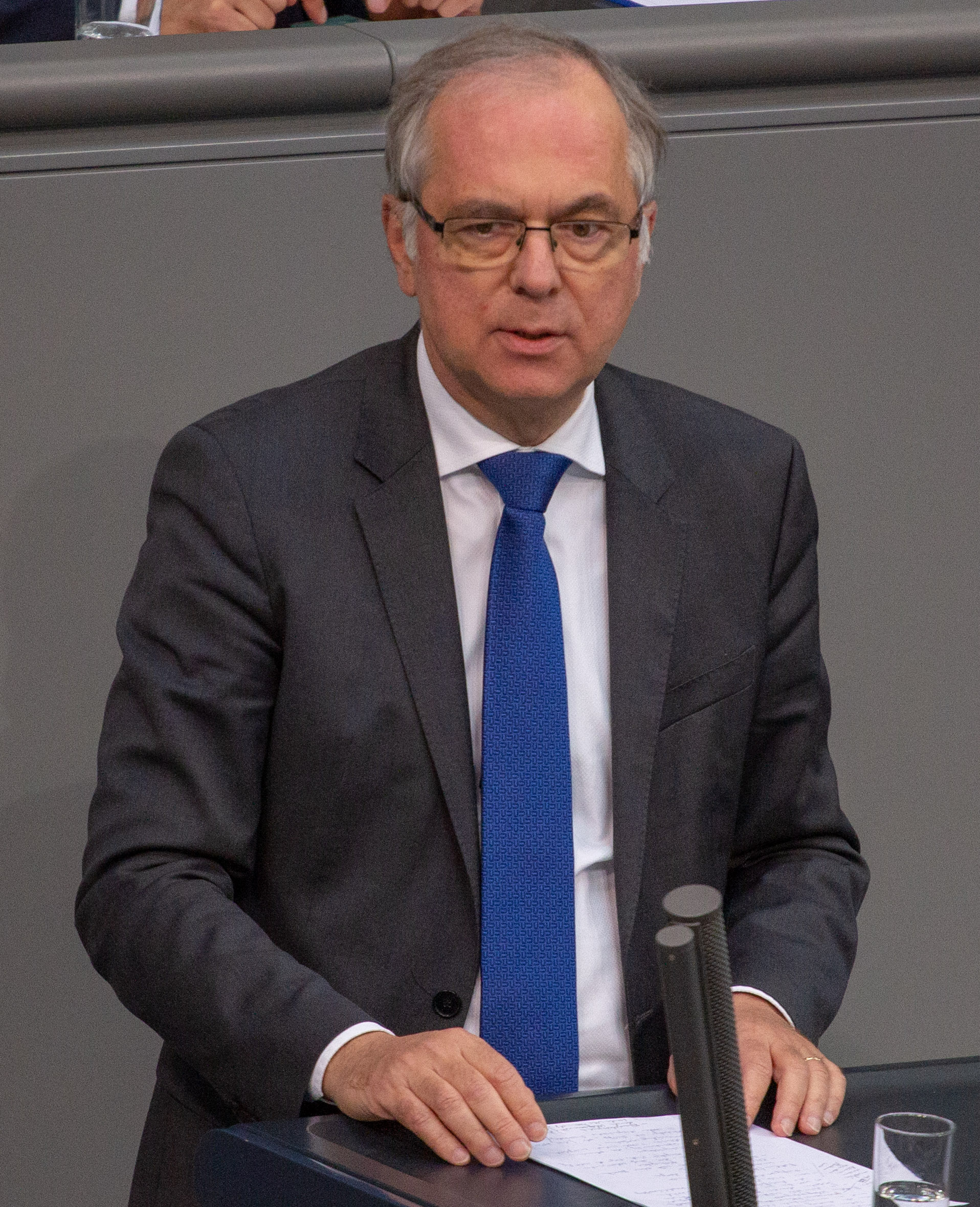 Heribert Hirte, Mitglied des Deutschen Bundestages, während einer Plenarsitzung am 12. April 2019 in Berlin.